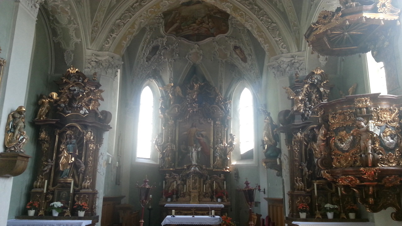 Altarraum und Kanzel der Pfarrkirche Karres, Tirol